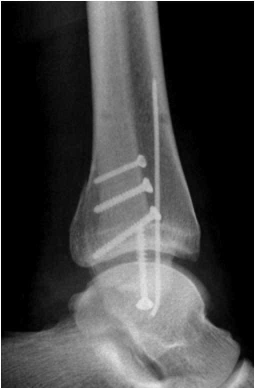 Sprunggelenkfraktur, Schraubenosteosynthese seitlich